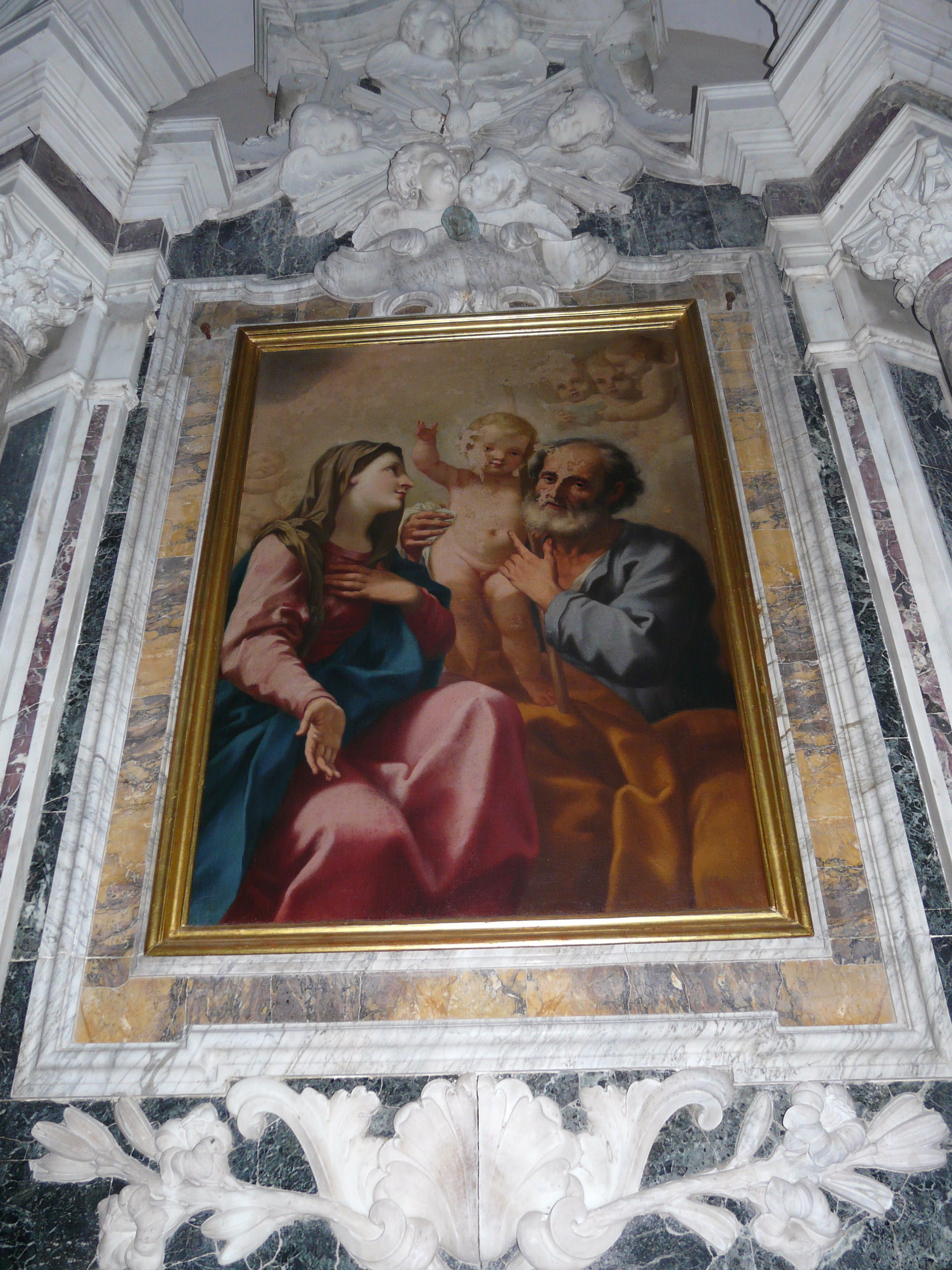 Oratorio dei Bianchi, Fosdinovo, Toscana, Italia